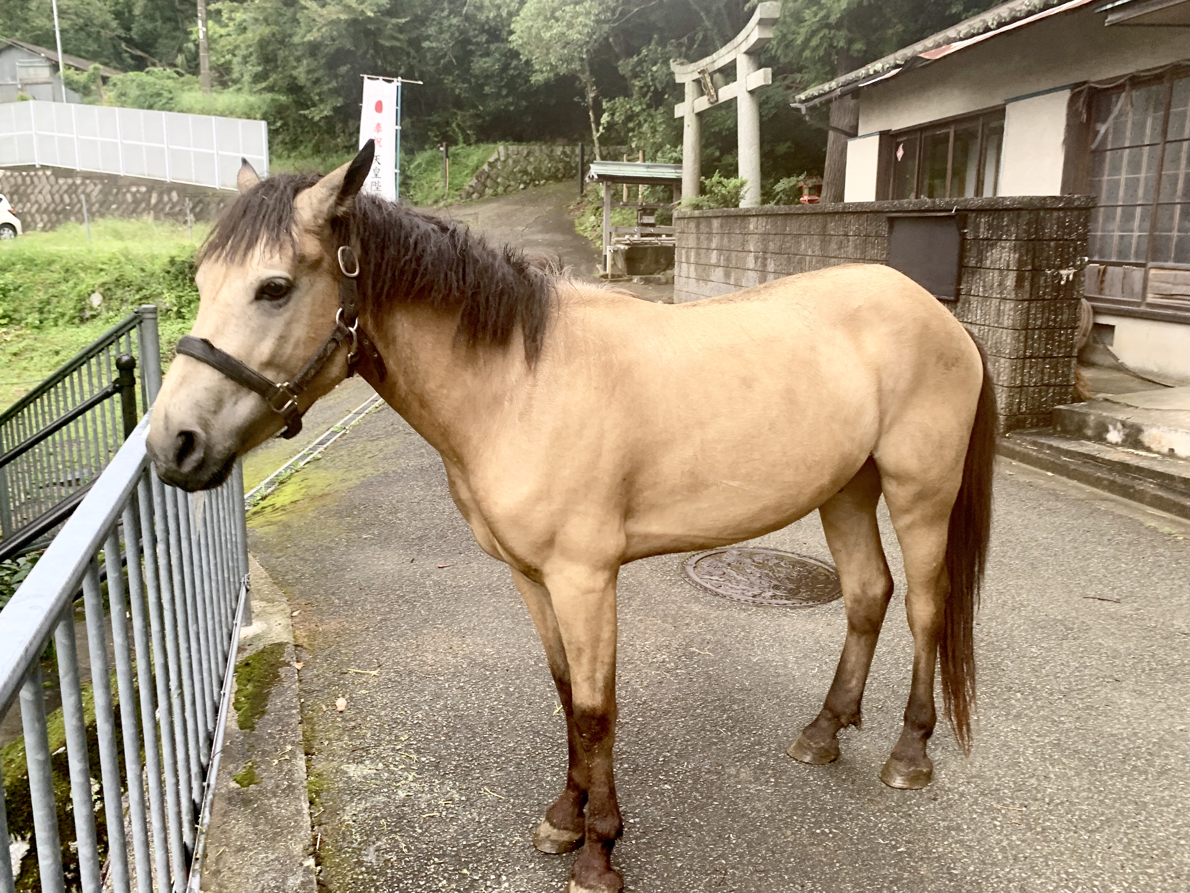 吉川八幡神社の御神馬いづめ画像です。